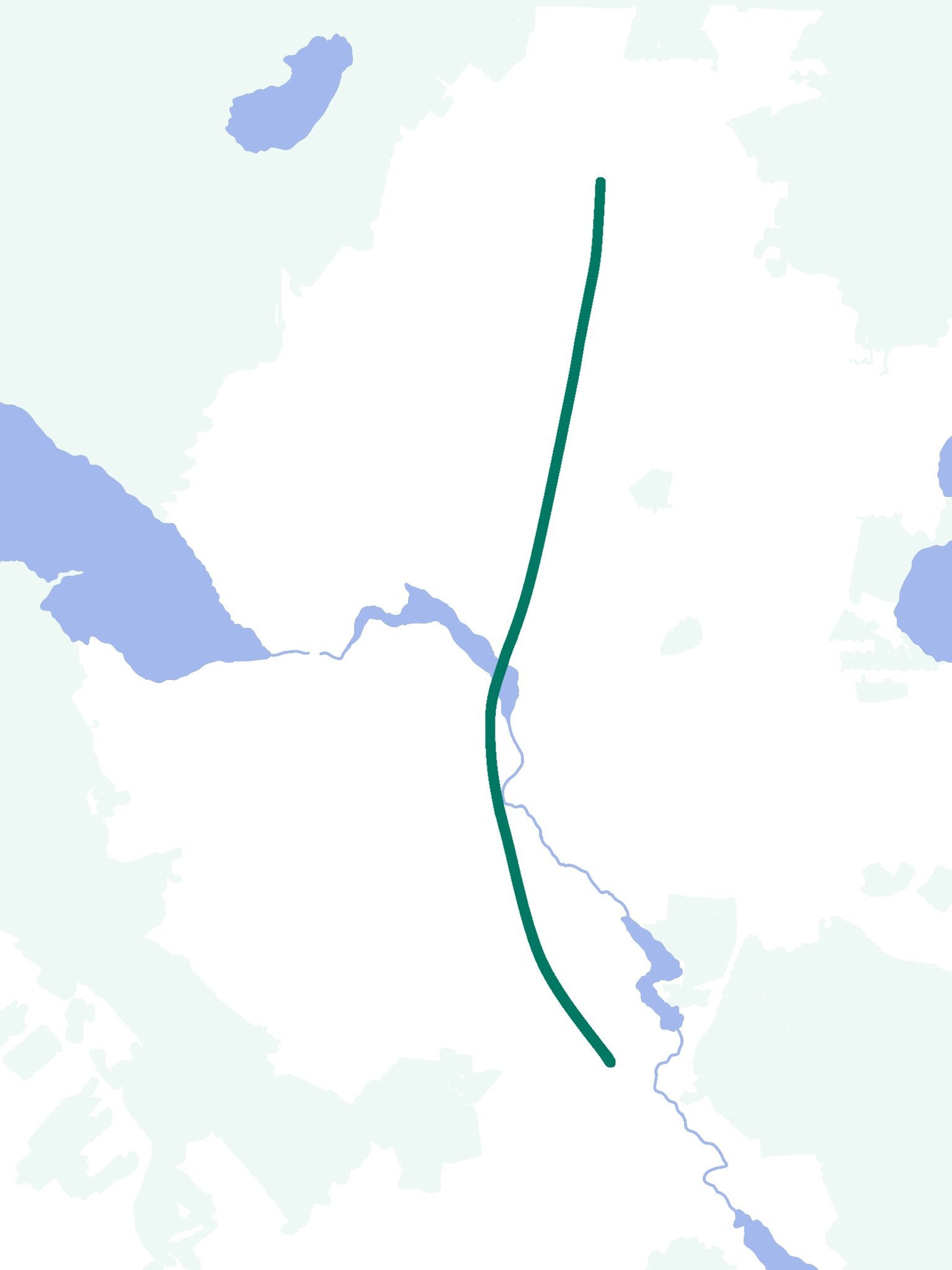 Ekaterinburg metropoliten map